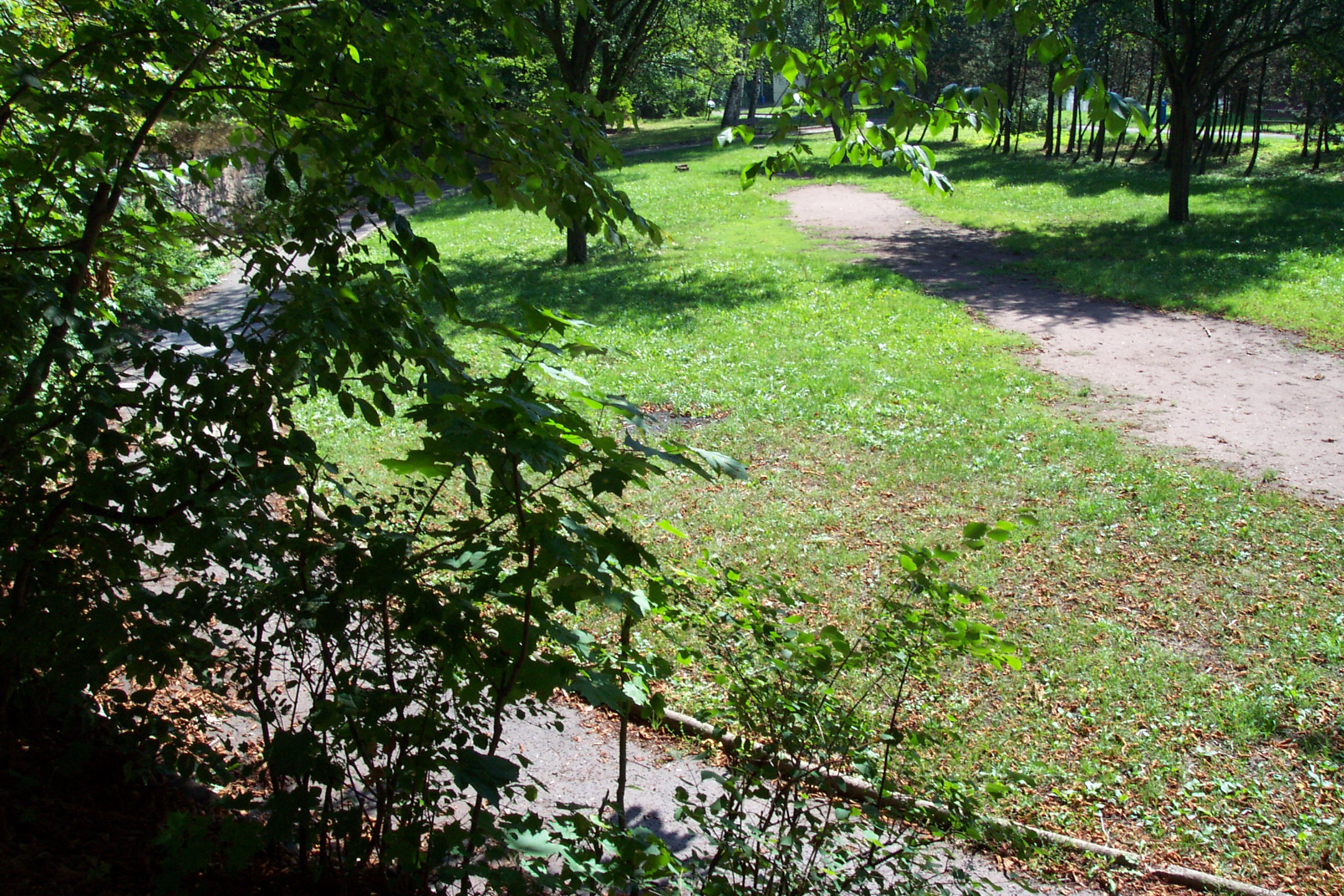 Dubí, Czech republic, former tram final station (now park) - Bývalá konečná teplických tramvají v Dubí